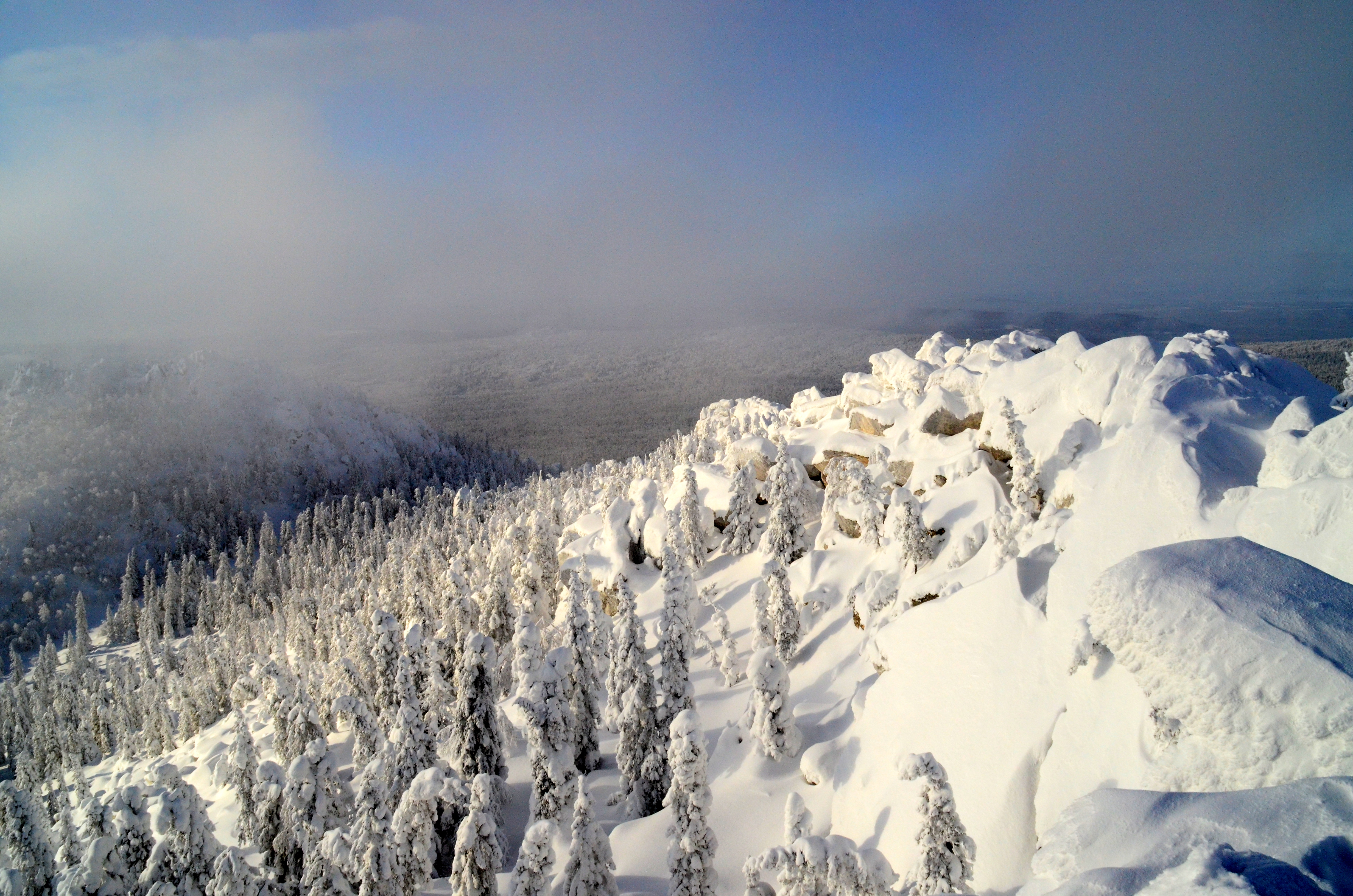 Таганай - вид с северной вершины Двуглавой сопки